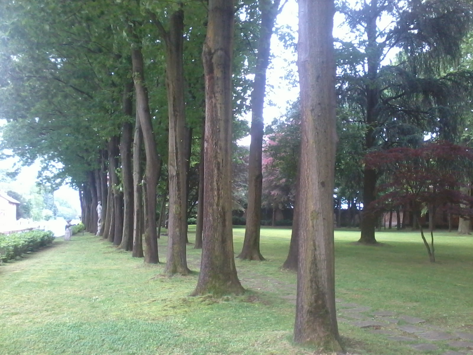 Parco di Villa Gaia a Robecco sul Naviglio (MI) - Italia